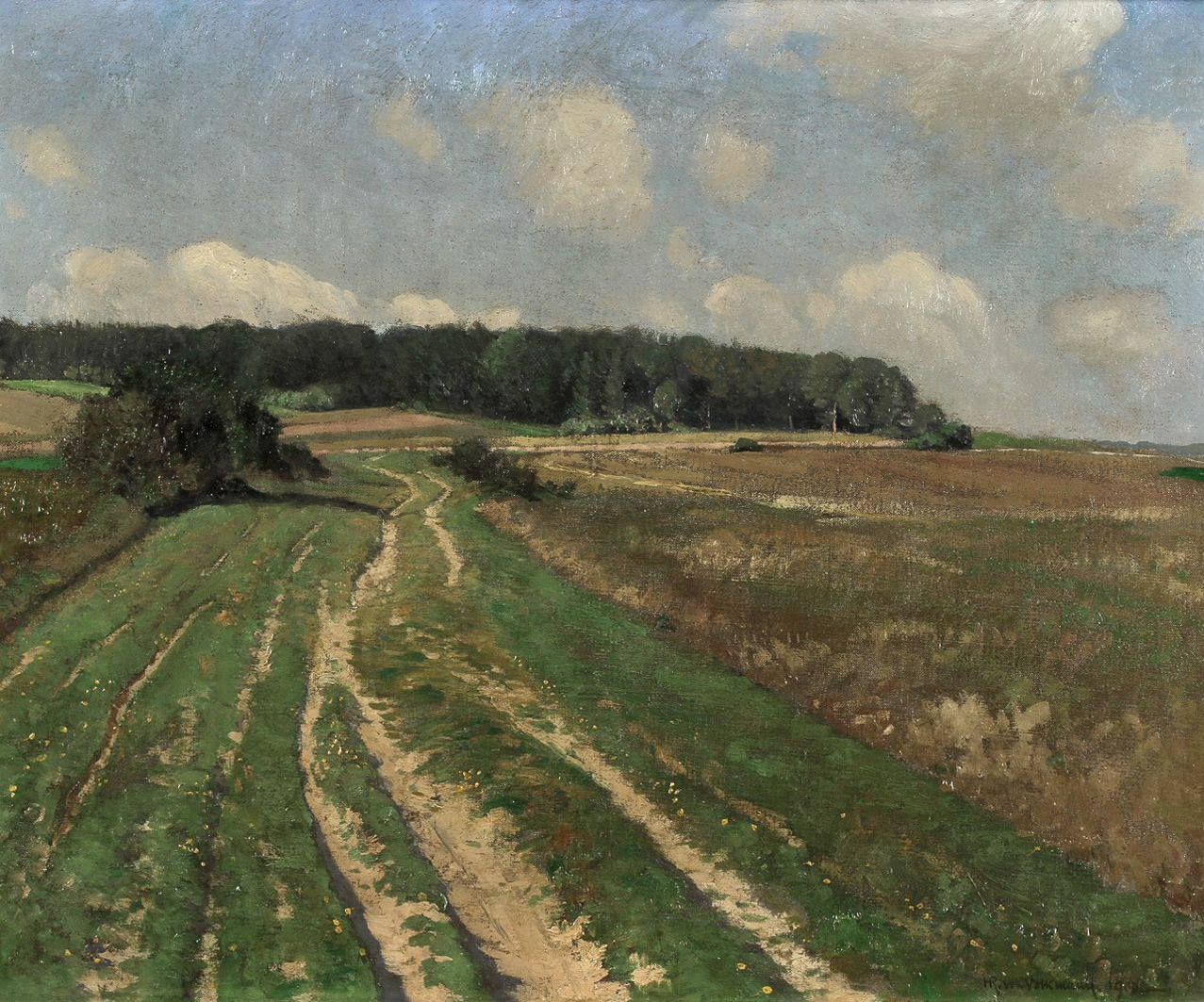 Feldweg. Öl auf Leinwand. 52 x 64 cm. Signiert und datiert HR von Volkmann 1900.